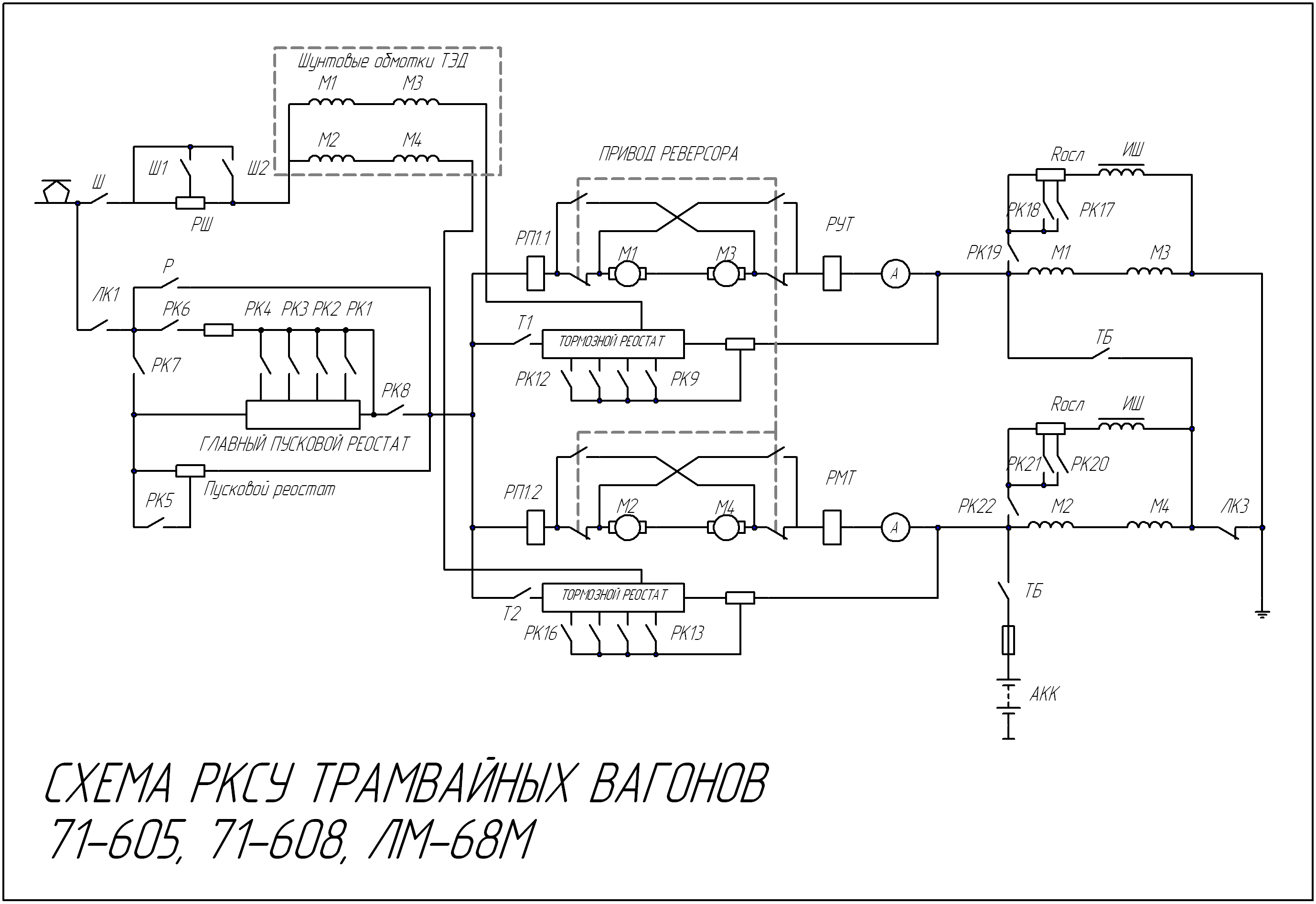 Схема силовых цепей реостатно-контакторной системы управления тяговыми двигателями трамвайных вагонов 71-605, 71-608, ЛМ-68М.